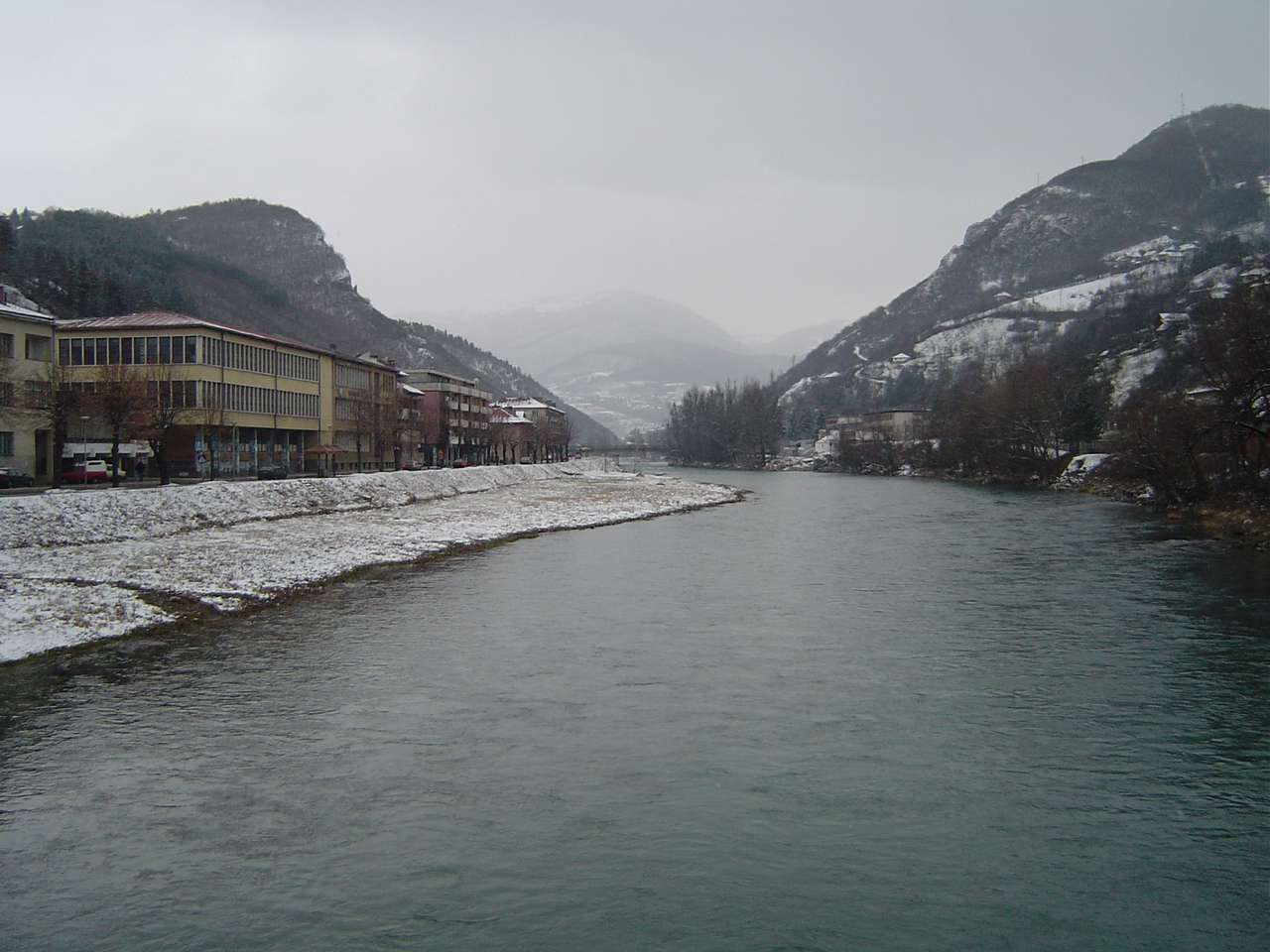 Lim River through Prijepolje